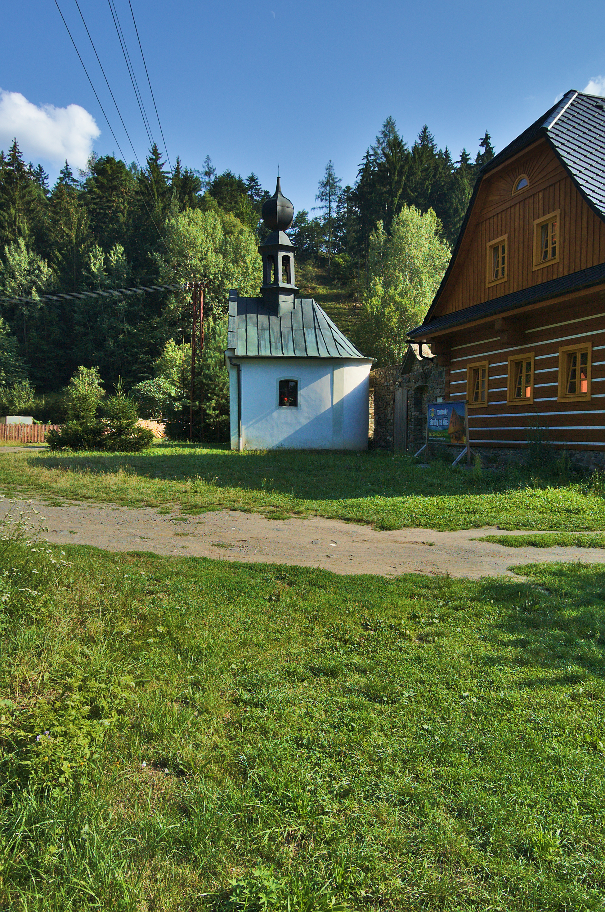 Kaple, Doly, Bouzov, okres Olomouc